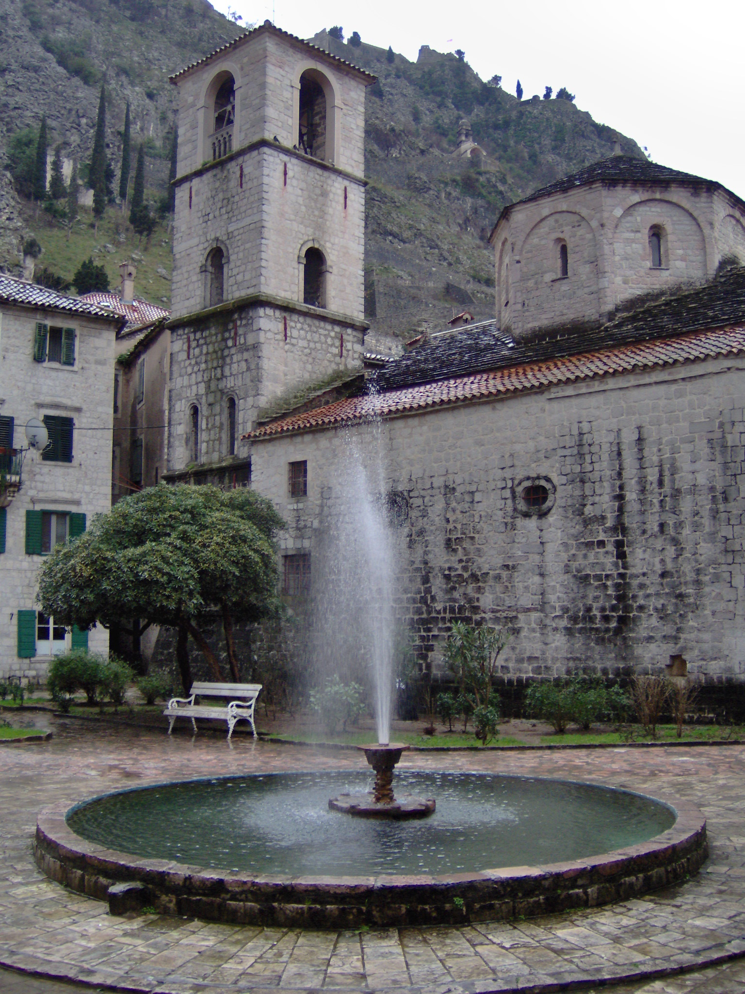 Kyrka i Kotor, Kotorbukten, februari 2007